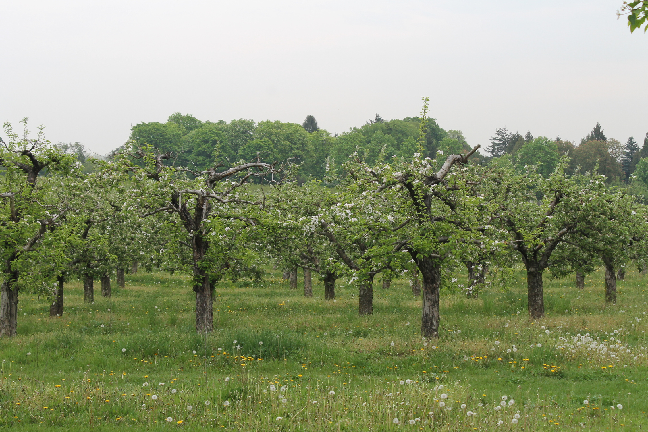 jabloňový sad, nejméně čtyřicet let starý, Brno Bohunice, Česká republika